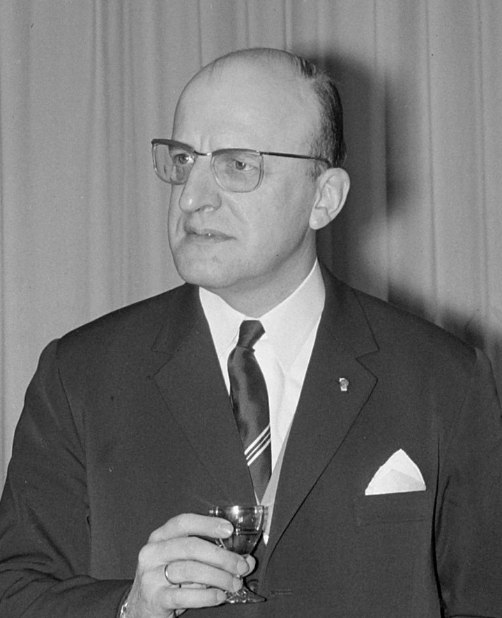 Belgische premier bij minister Marijnen op bezoek, v.l.n.r. minister Luns , Lefevre en Marijnen